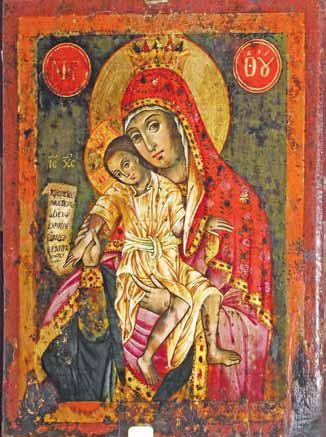 Ikona, Bogorodica Eleusa-Kikoska, galerija na ikoni vo Prilep, vtora polovina na XVIII vek.